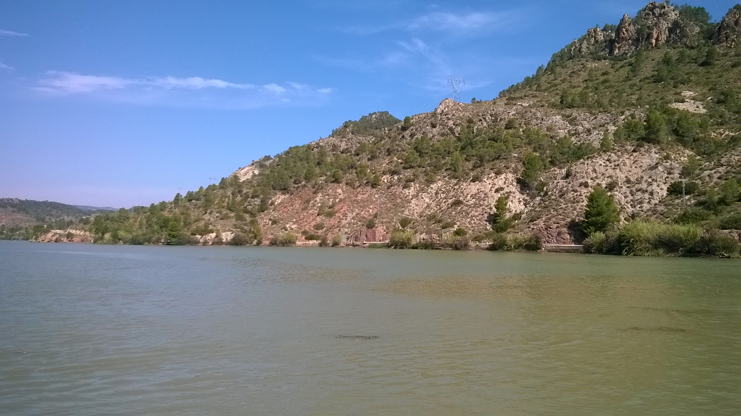 Vistas de Cofrentes tomadas durante el verano de 2014 por Isabel Valiente de la Granja.